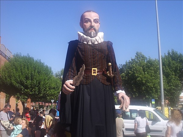 Gigantes de Alcalá de Henares